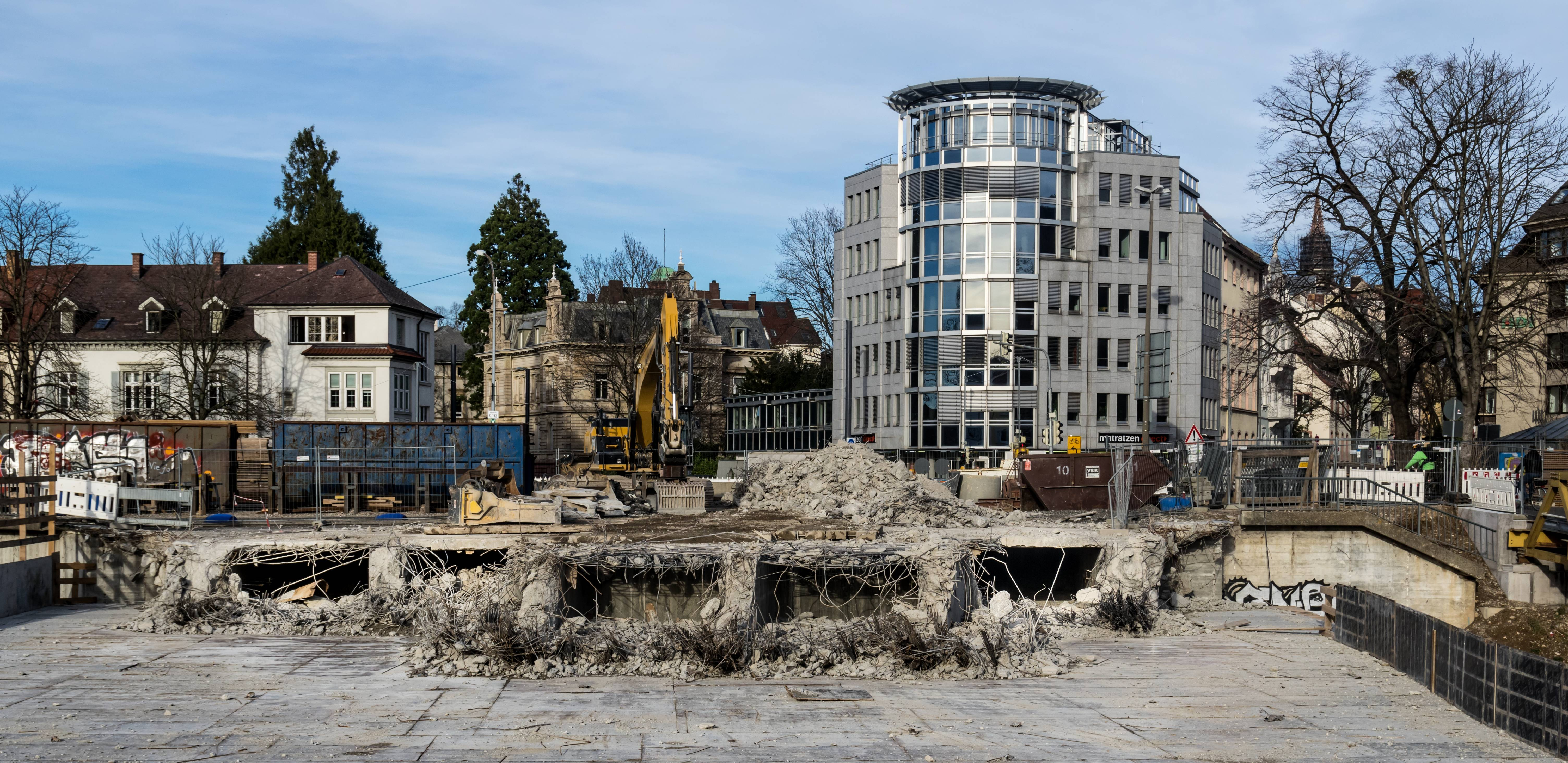 Bilder aus Freiburg